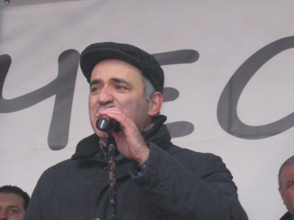 Митинг «За честные выборы!» в Санкт-Петербурге 25 февраля 2012 года. Выступает Гарри Каспаров.